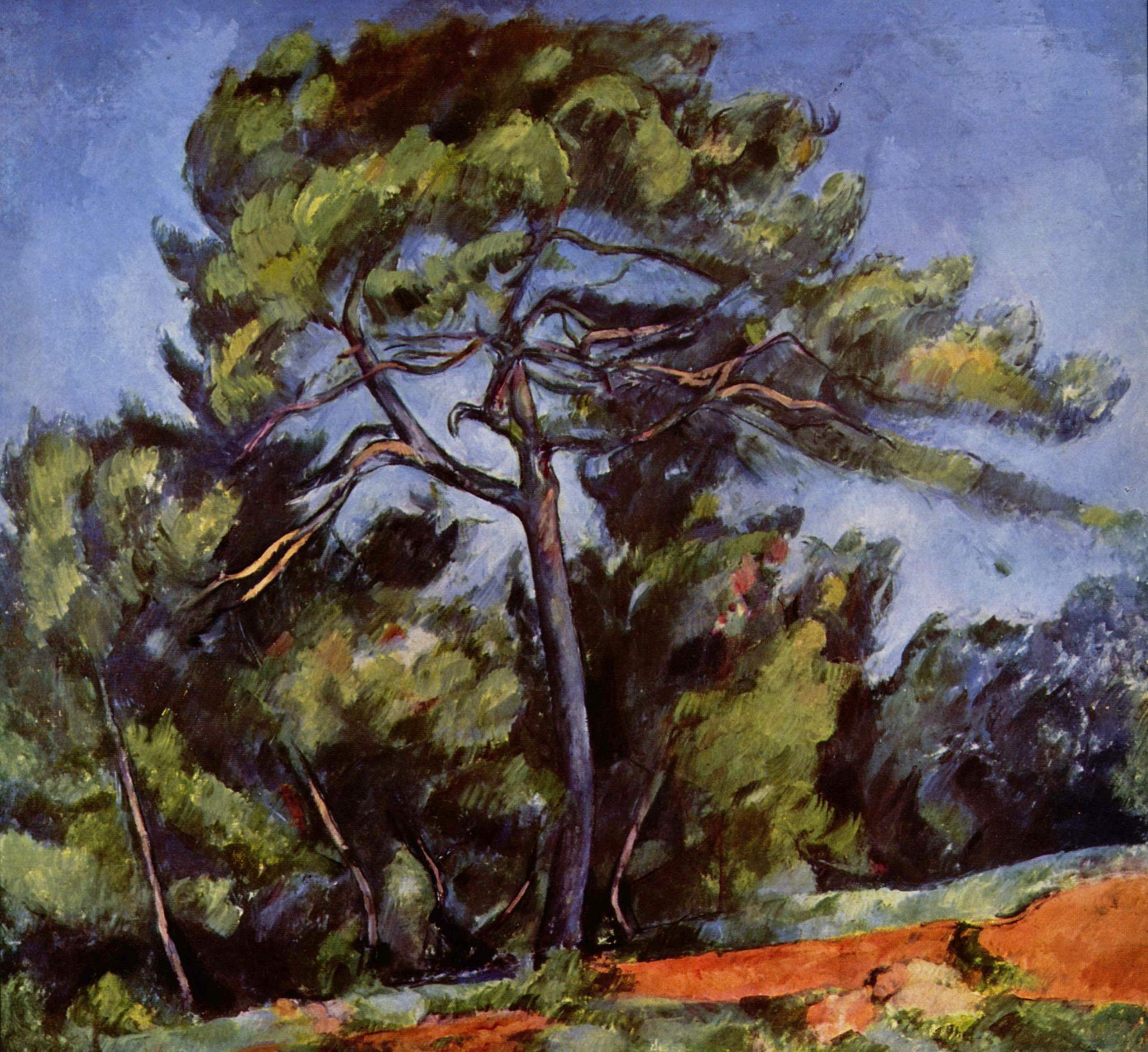 Die große Kiefer